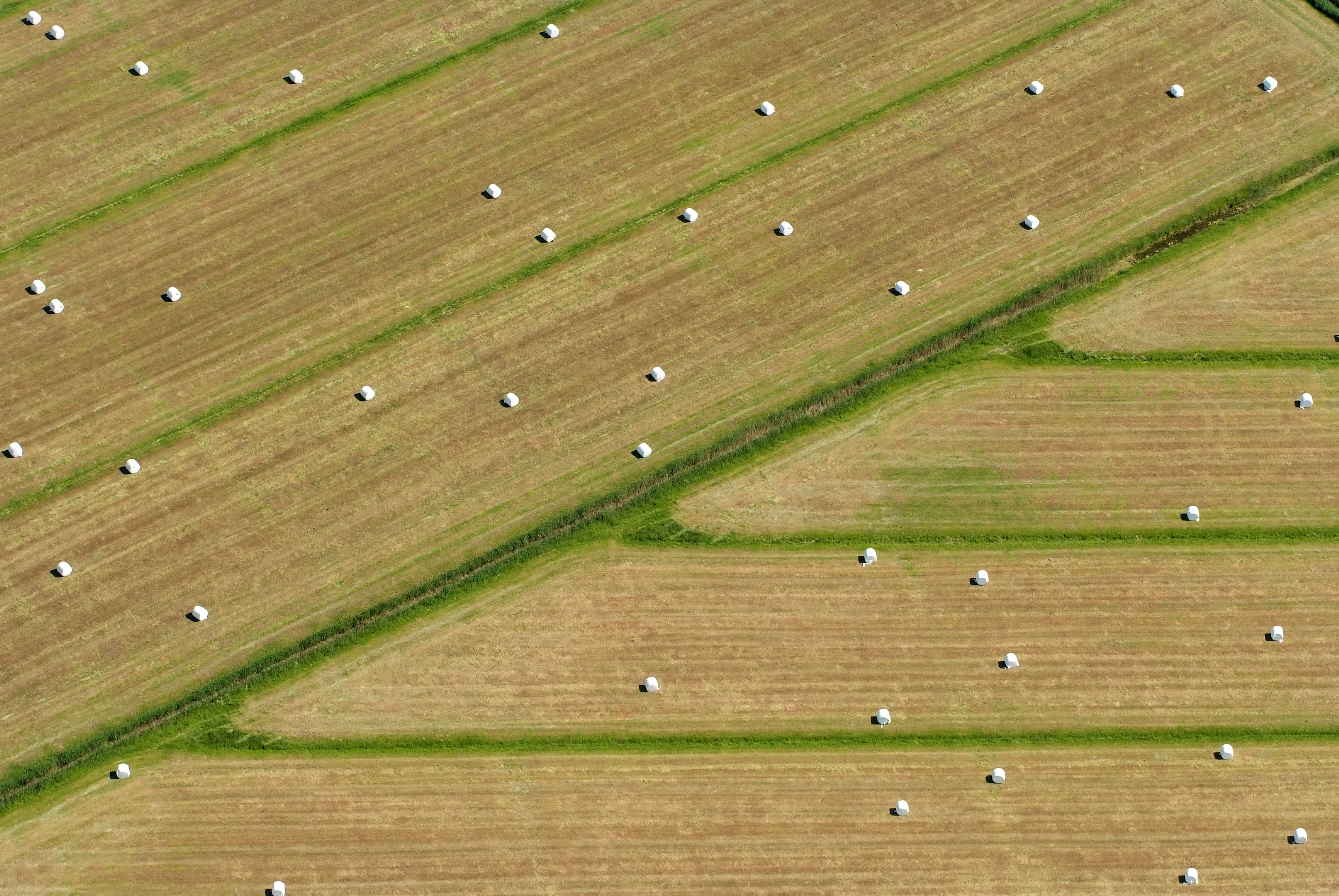 Marschland in Augustgroden (Fotoflug vom Flugplatz Nordholz-Spieka über Cuxhaven und Wilhelmshaven)